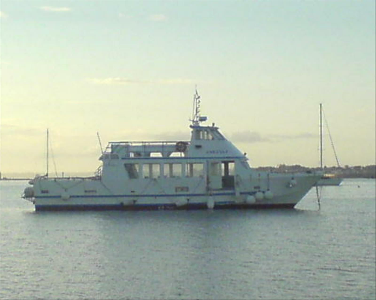 Vedette à passagers Enez Vaz